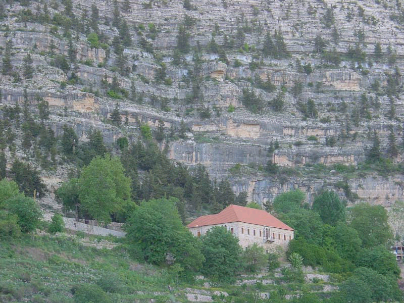 Mar_Sarkis_Ehden_June_2003.jpg